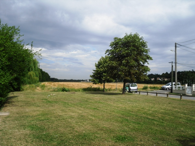 La plaine agricole de Champrosay à Draveil (Essonne, Île-de-France, France).